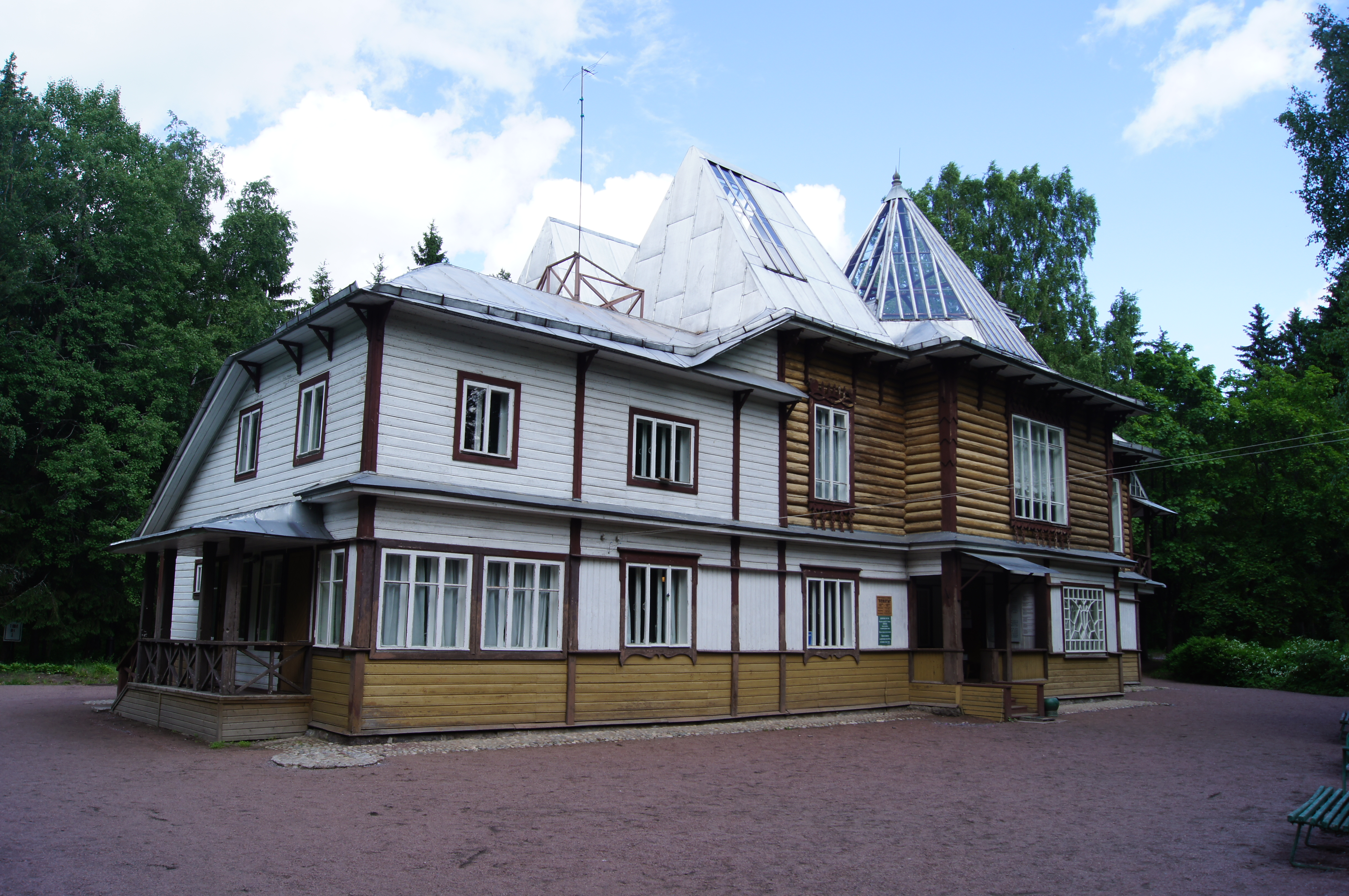 Жилой дом: Приморское шоссе, 411, Репино, Курортный район, Санкт-Петербург